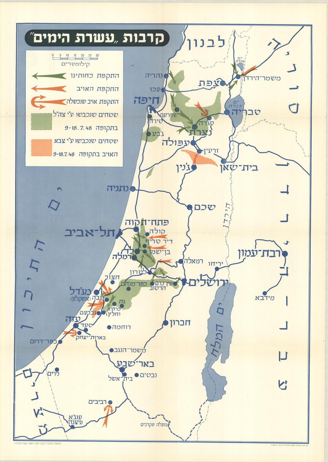 קרבות עשרת הימים.